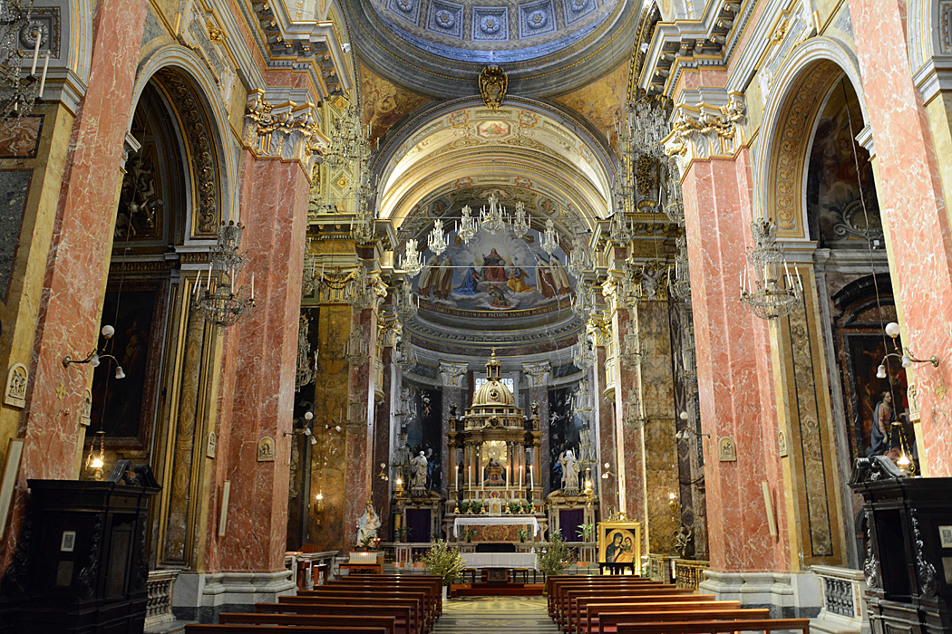 Die Kirche Santa Maria della Scala in Rom (Trastevere)